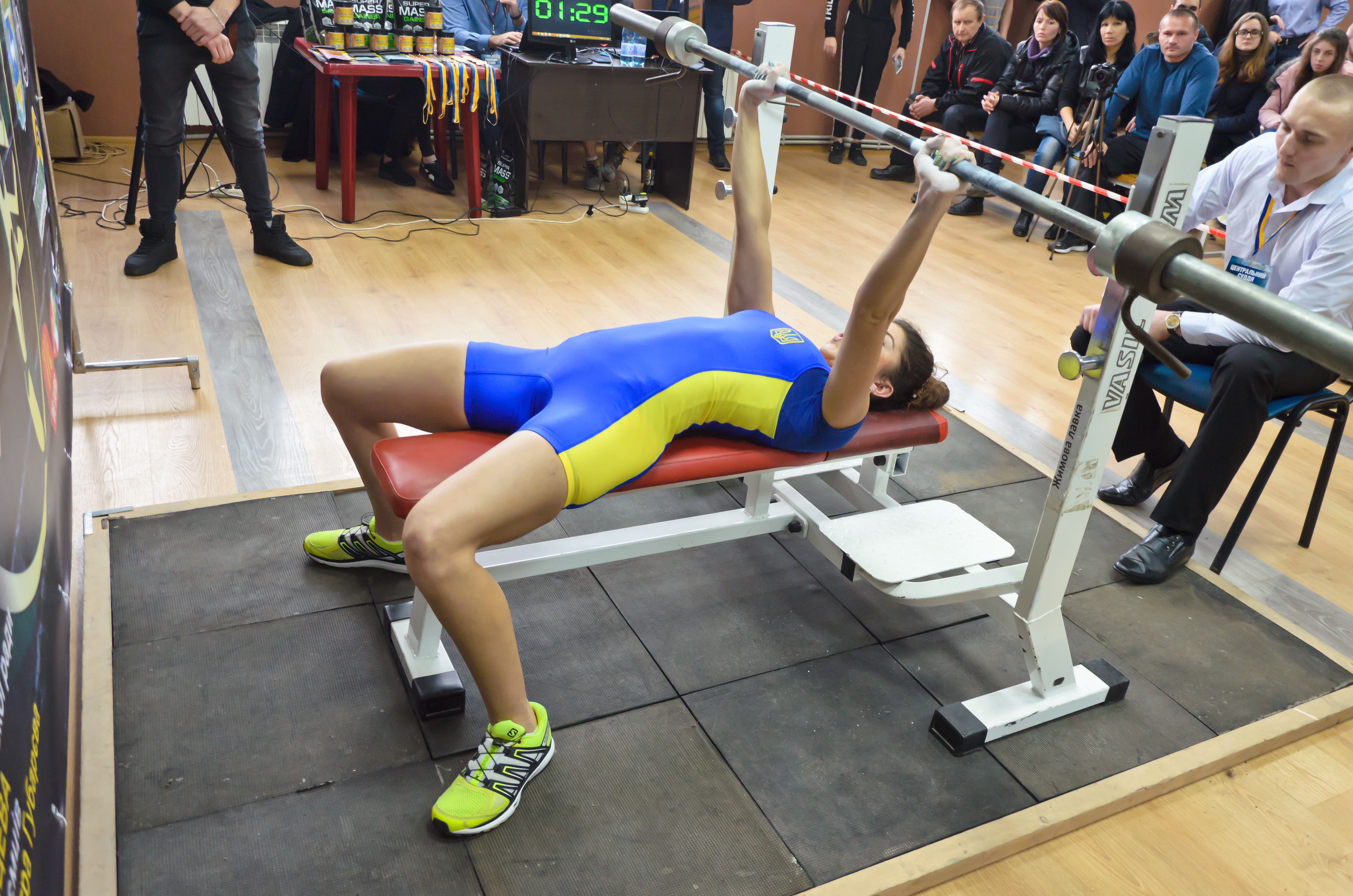 Багатоповторний жим в дії. Спортсменка виконує вправу на чемпіонаті України в Олександрії.